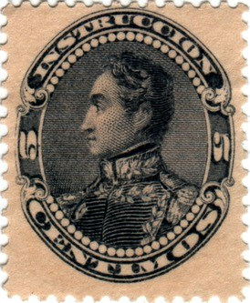 Busto de perfil de Simon Bolivar estampilla venezolana de 5 centimos del años 1893